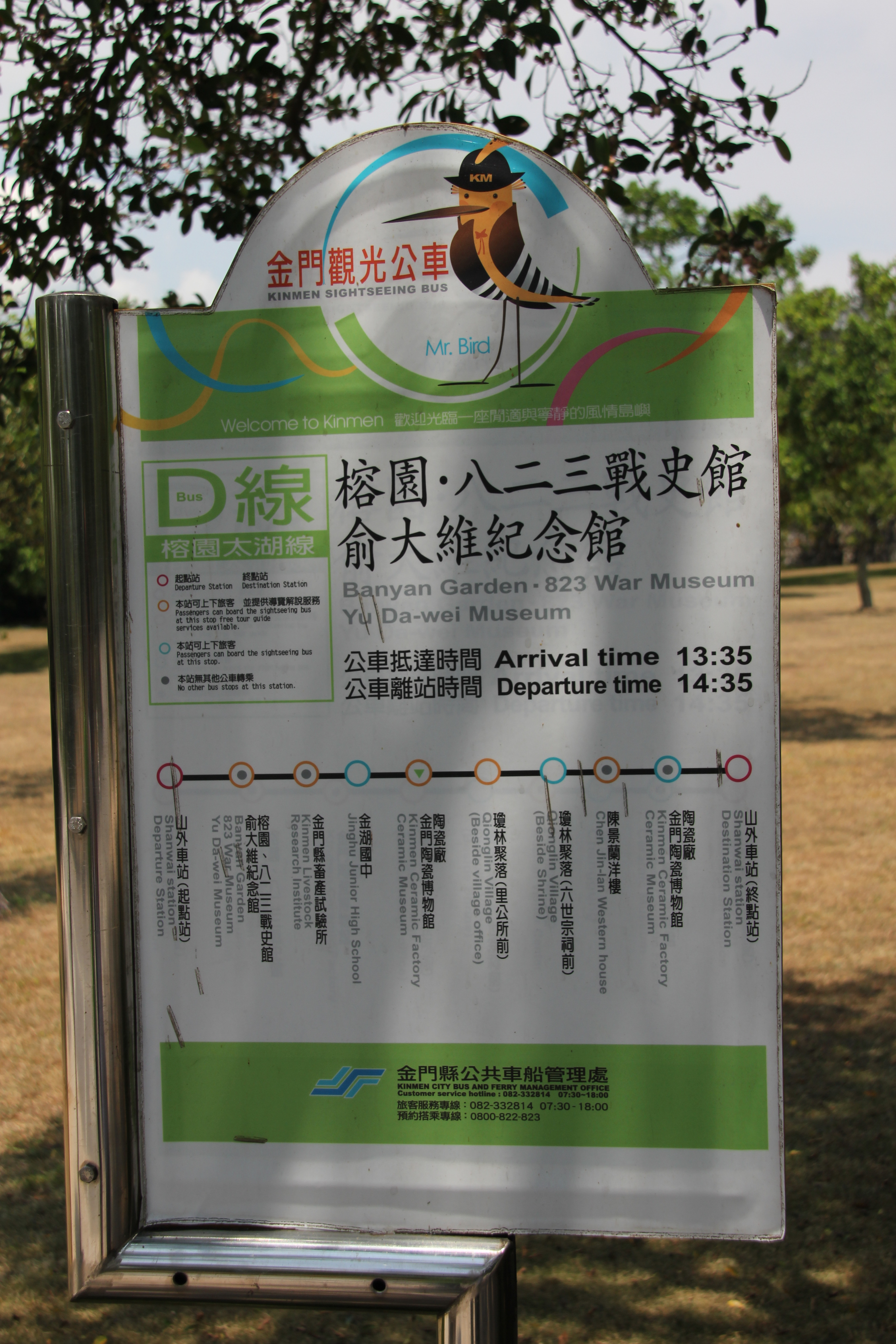 金門縣公共車船管理處金門觀光公車D線「榕園、八二三戰史館、俞大維紀念館」站牌。